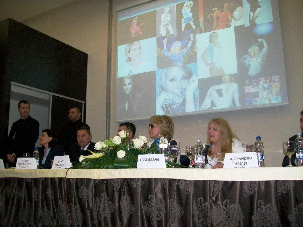 Lepa Brena susţine o conferinţă de presă la Timişoara, după 28 de ani.